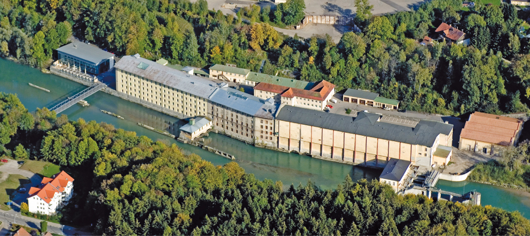 Ehemalige Textilfabrik zu Kottern (Kempten)